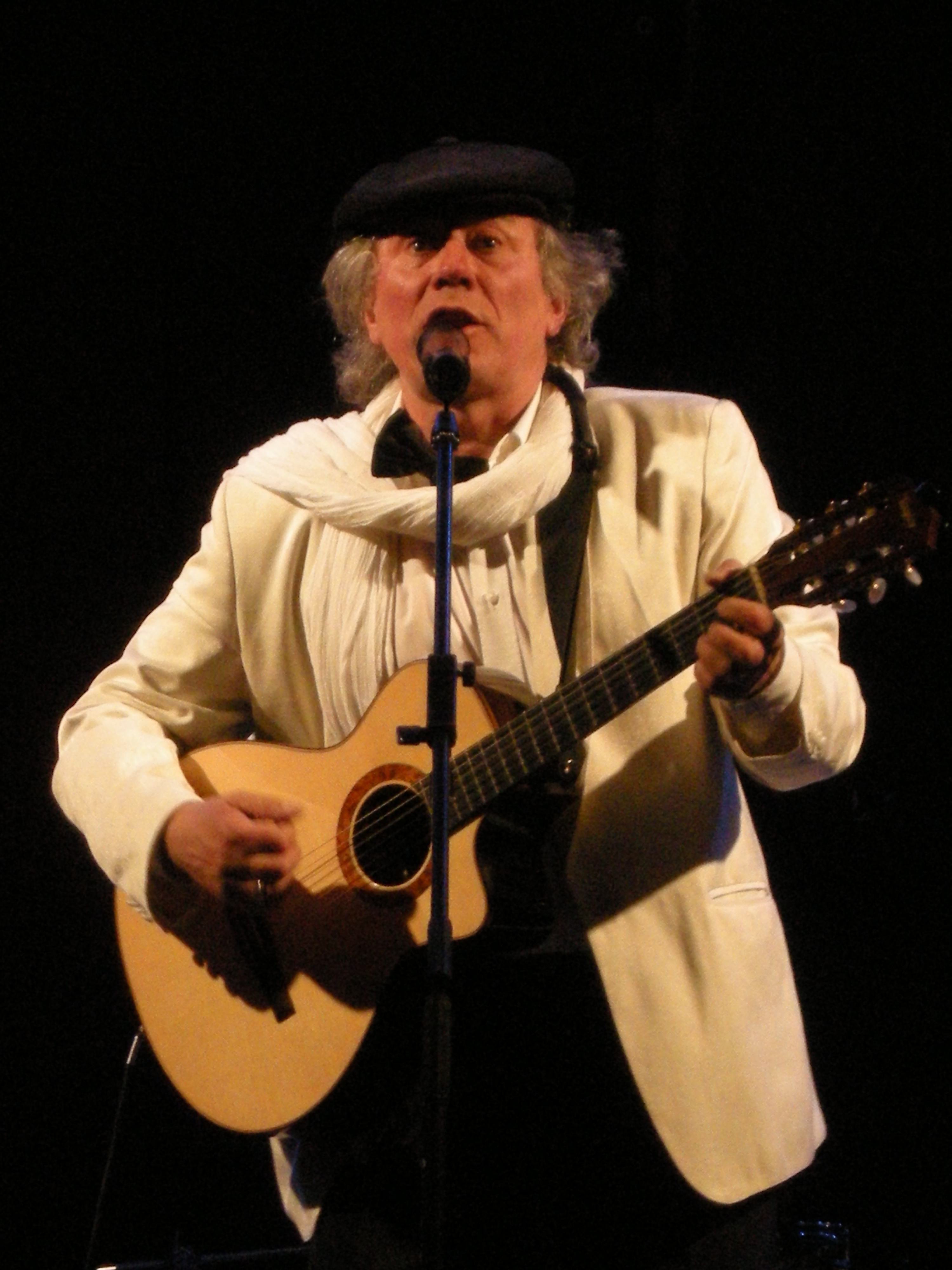 Віктор Морозов під час виступу у Львові.